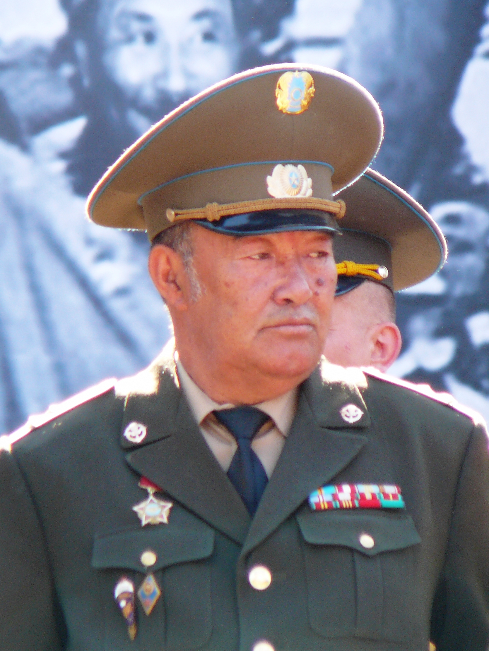 Керимбаев Борис Тукенович. Бывший командир 177-го отдельного отряда специального назначения. Алматы. 9-е мая 2009-го года